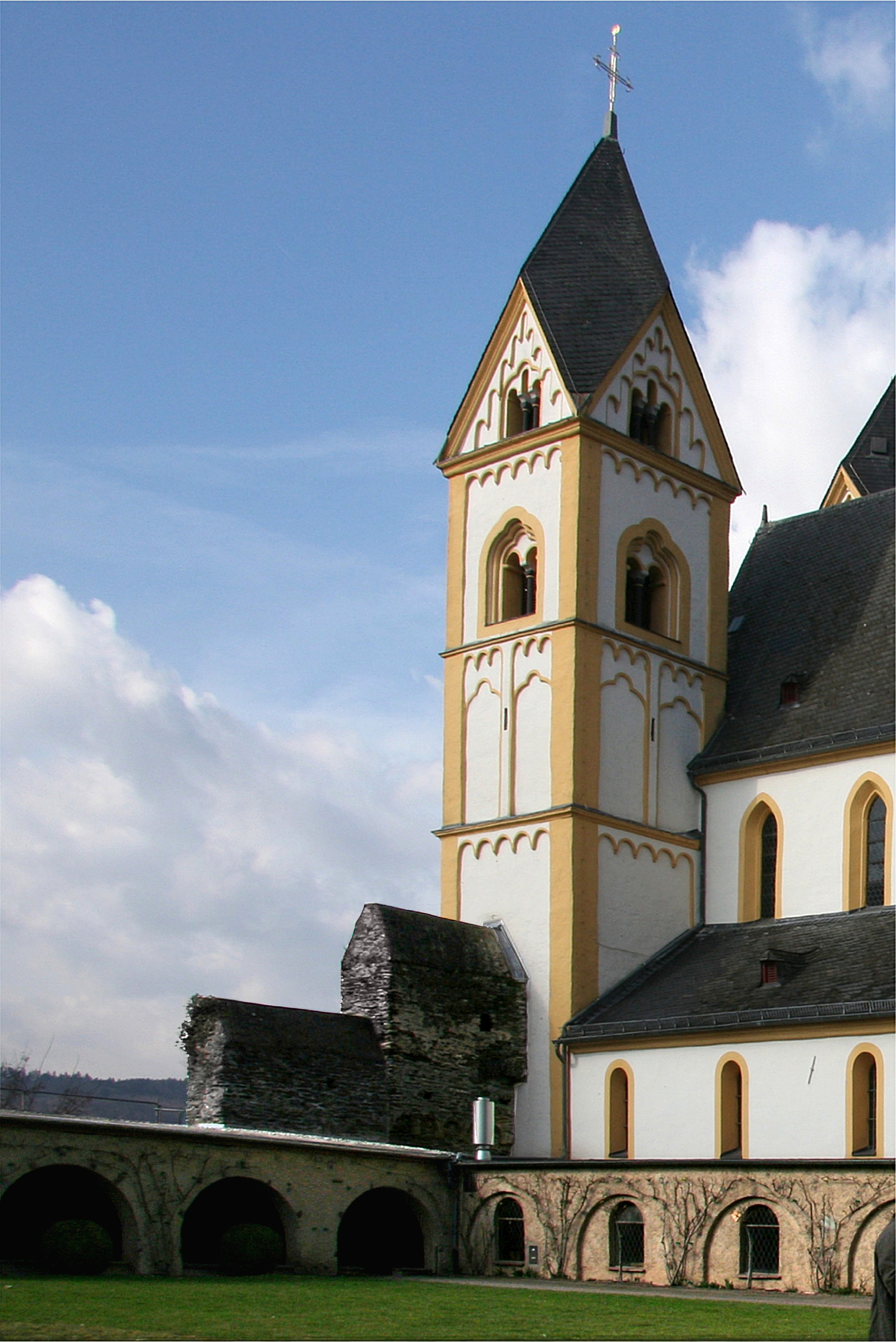 Kloster Arnstein bei Obernhof an der Lahn – Südwestturm und Teil der alten Burgmauer